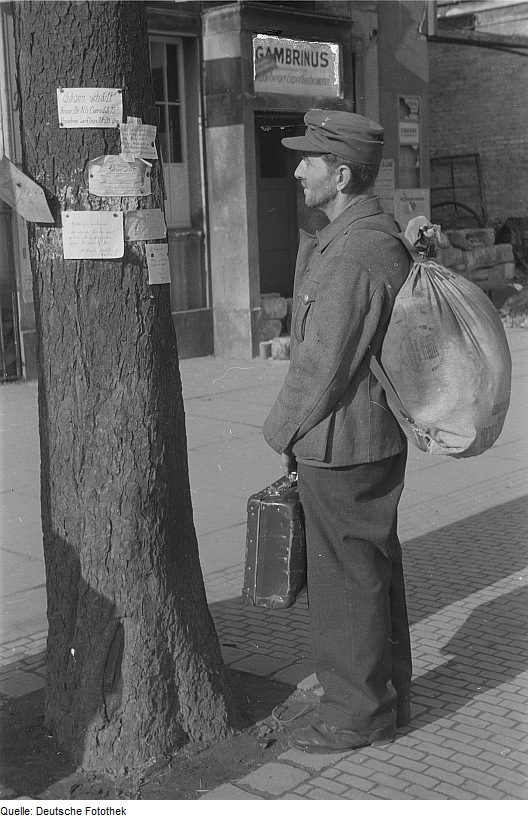 Original image description from the Deutsche Fotothek Heimkehrer aus der Kriegsgefangenschaft sucht Namen von Angehörigen auf Anschlagzetteln an einem Baum